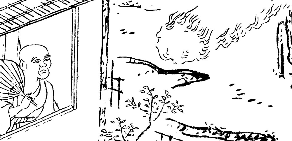 Kumobi (蜘蛛火, Will-o'-the-wisp) from the Seiban Kaidan Jikki (西播怪談実記)